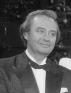 12.12.1986 Weihnachtskonzert "Lieder öffnen unsere Herzen". veranstaltet vom Kuratorium ZNS für Unfallverletzte mit Schäden des zentralen Nervensystems e. V. in der alten Oper Frankfurt. Die Präsidentin des Kuratoriums ZNS, Hannelore Kohl, lud zu diesem festlichen Abend Mitbürger, die sich helfend in den Dienst ihrer Mitmenschen stellen, ein, um ihnen für ihren Einsatz zu danken. Durch den Abend fürhte die Fernseh-Moderatorin, Carolin Reiber.